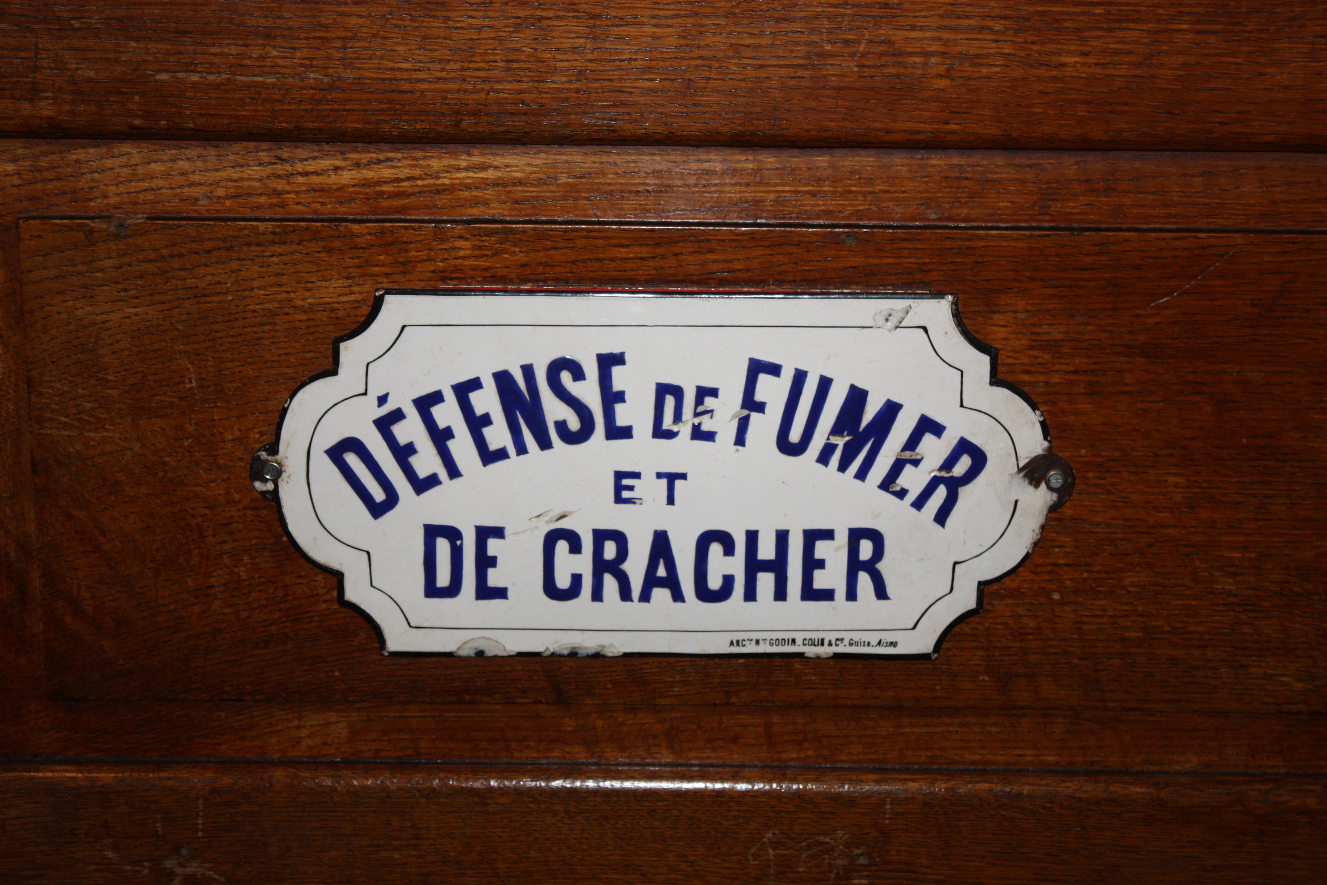 reconstitution de rue magasin maison Musée du textile et de la vie sociale à Fourmies